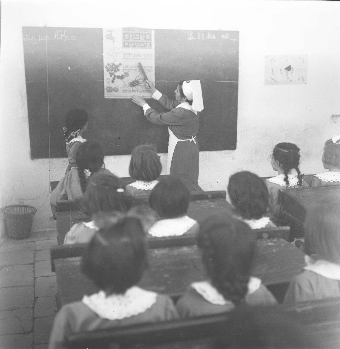 אוסף צילומים של הצלם זולטן קלוגר טווח מספרי התשלילים 24742 - 24833: הדסה ירושלים, אחות מלמדת, בתי הספר של "אליאנס".